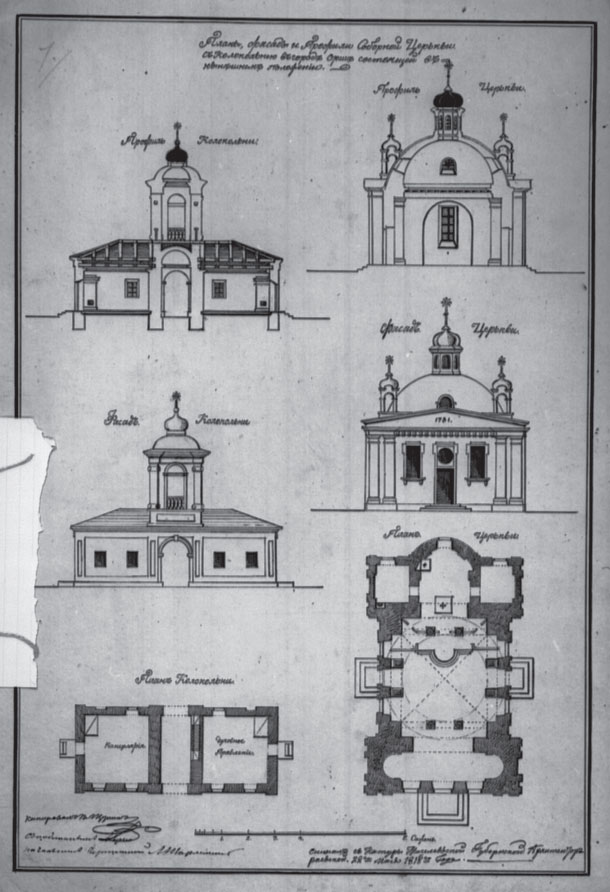 Беларуская (тарашкевіца): Ворша (Vorša), Зааршыньне (Zaaršyńnie). Царква Нараджэньня Божай Маці, абмеры